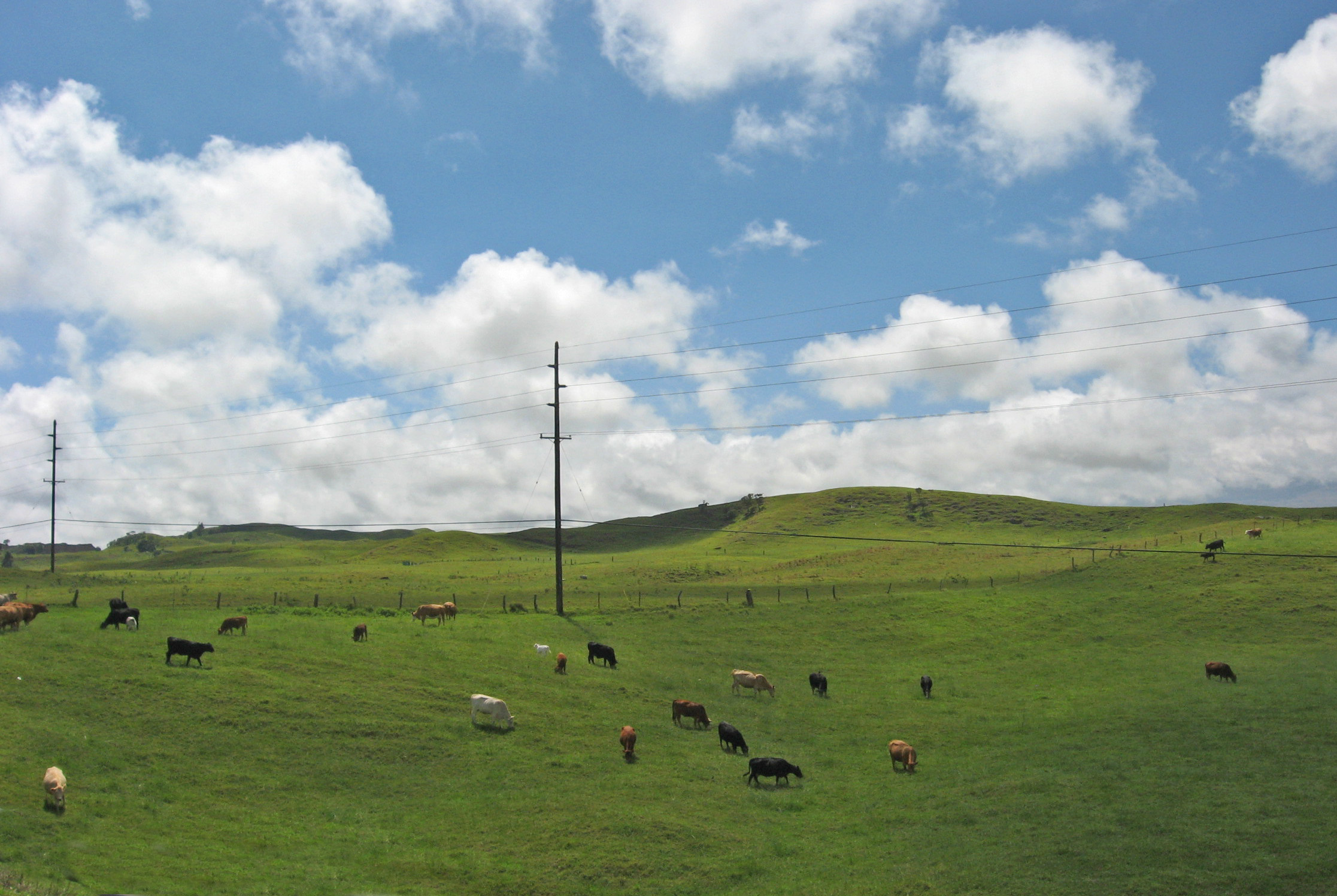 Pastures outside Waimea, Hawaii